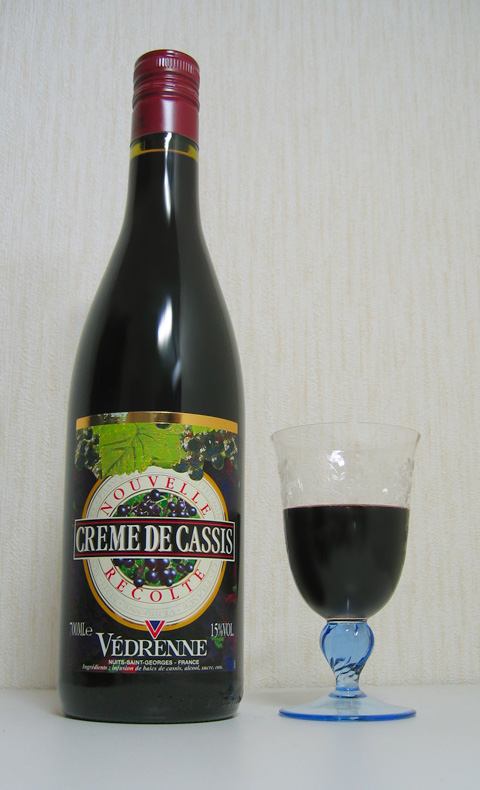 VEDRENNE Creme de Cassis